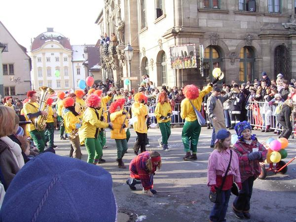 Ellingen vor dem Rathaus, Teil des großen Faschingszuges am Faschingsdienstag nachmittag